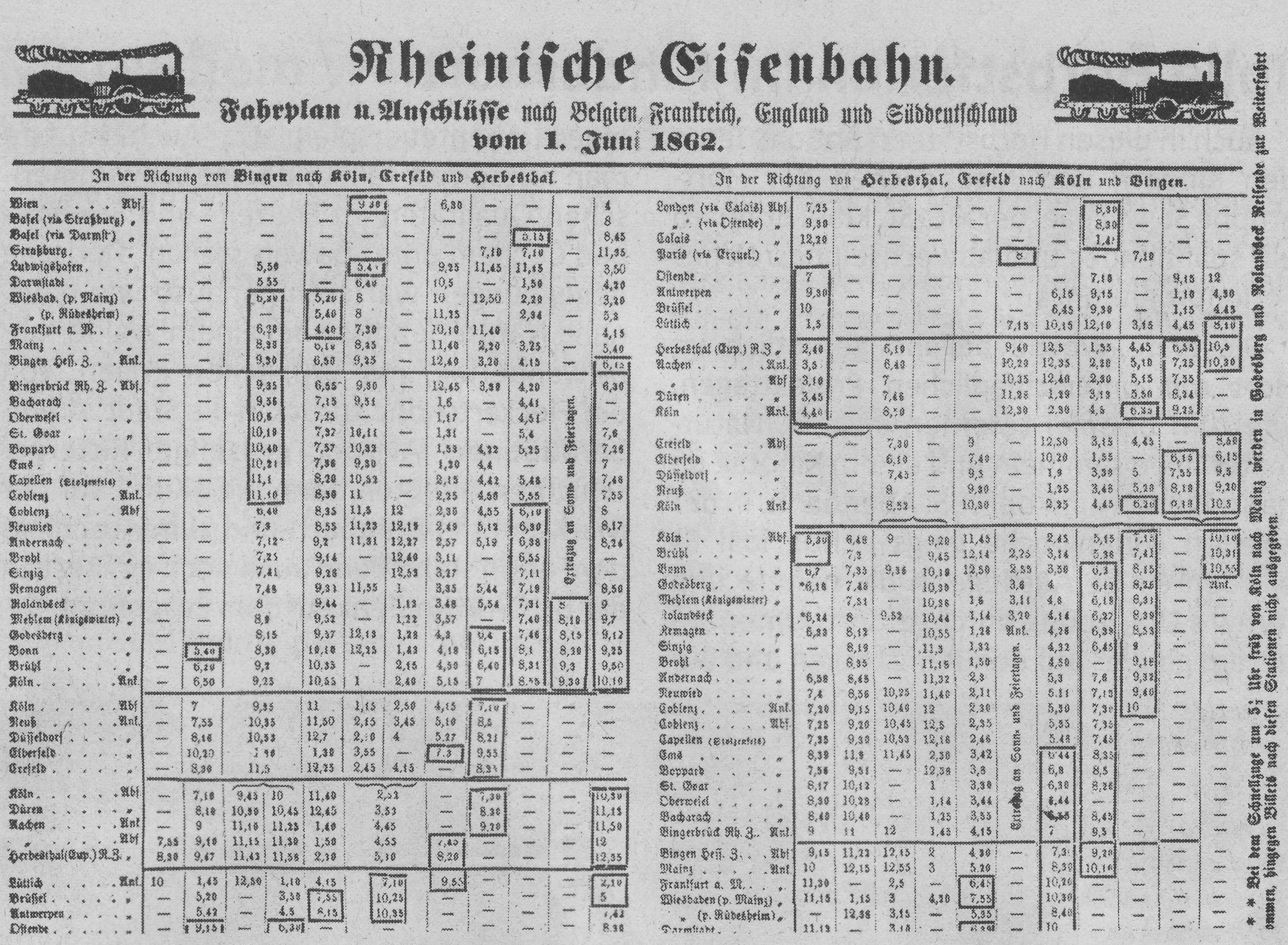 Bildunterschift in Rund um Boppard: Einer der ältesten heimatlichen Fahrpläne, der auch das im Jahre 1859 erweiterte linksrheinische Streckennetz abdeckte, stammt aus dem Jahre 1862. (Pepro: Sammlung Jürgen Johann)